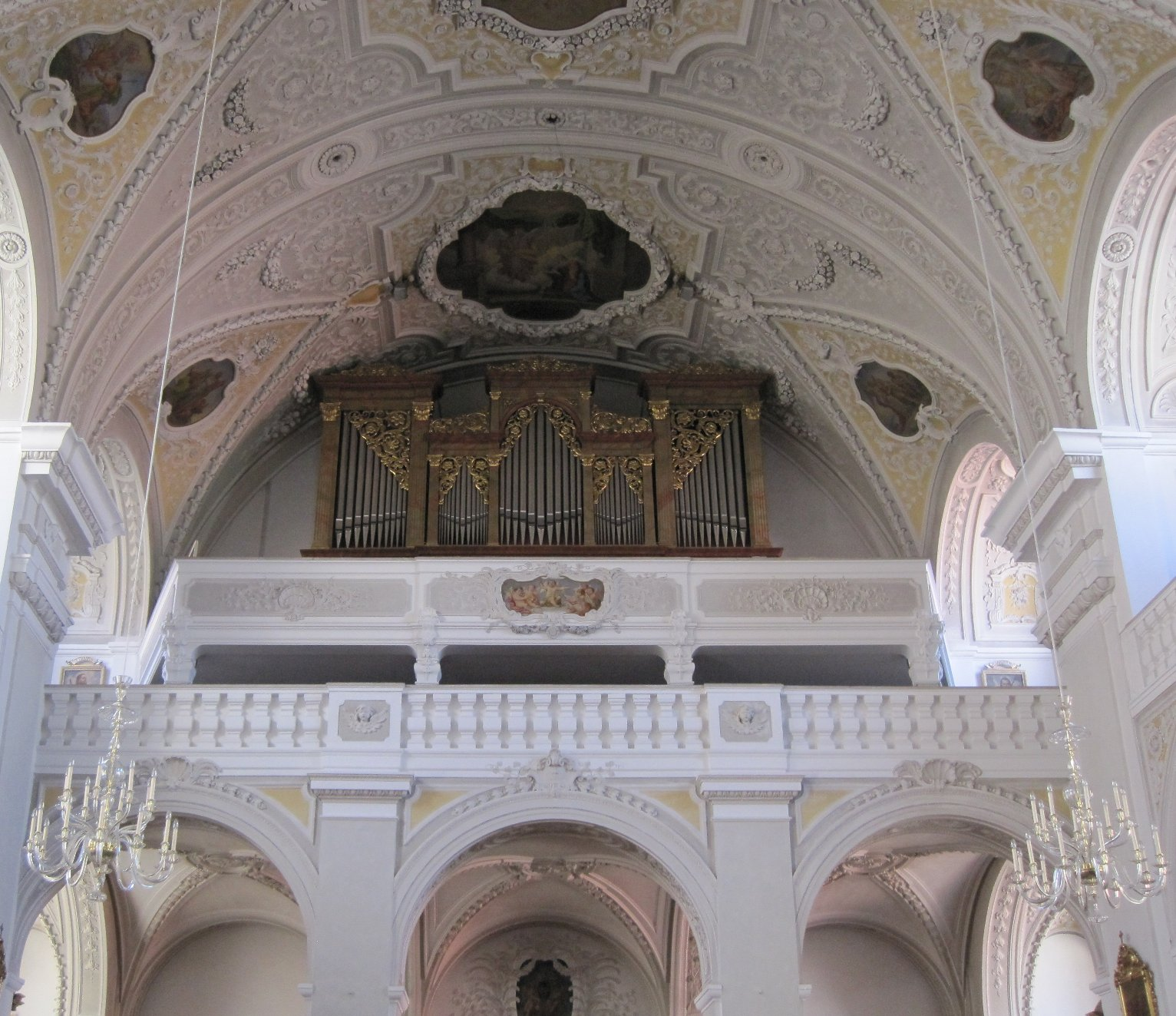 Orgel von St. Oswald in Traunstein (Papst-Benedikt-Orgel)